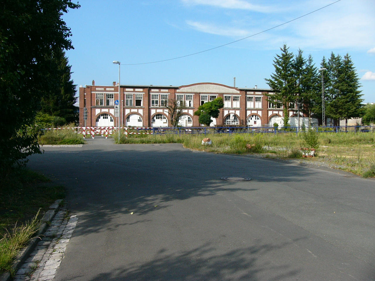 Industriedenkmal Schokoladenfabrik in St. Georgen